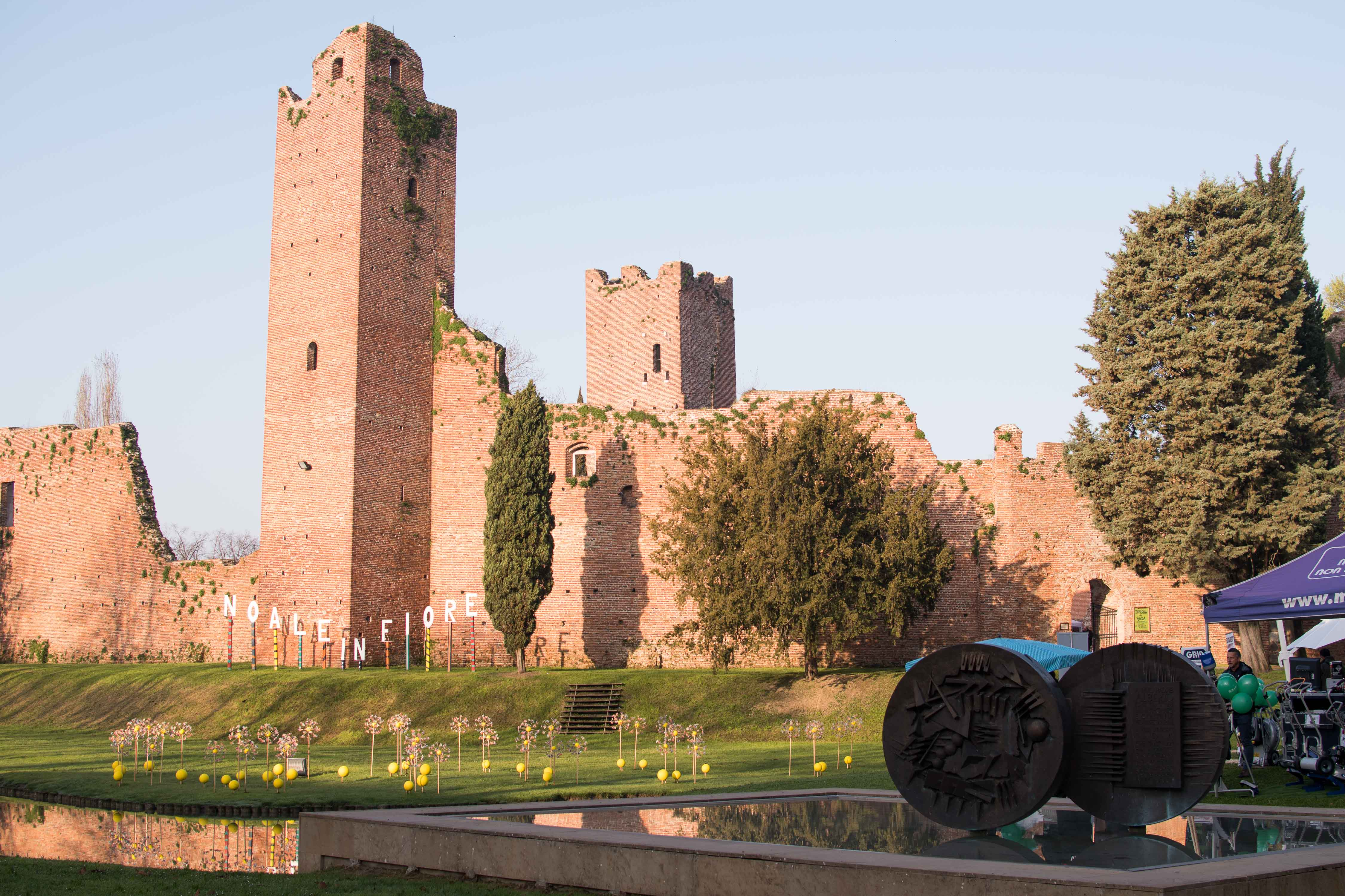 Rocca dei Tempesta This is a photo of a monument which is part of cultural heritage of Italy.